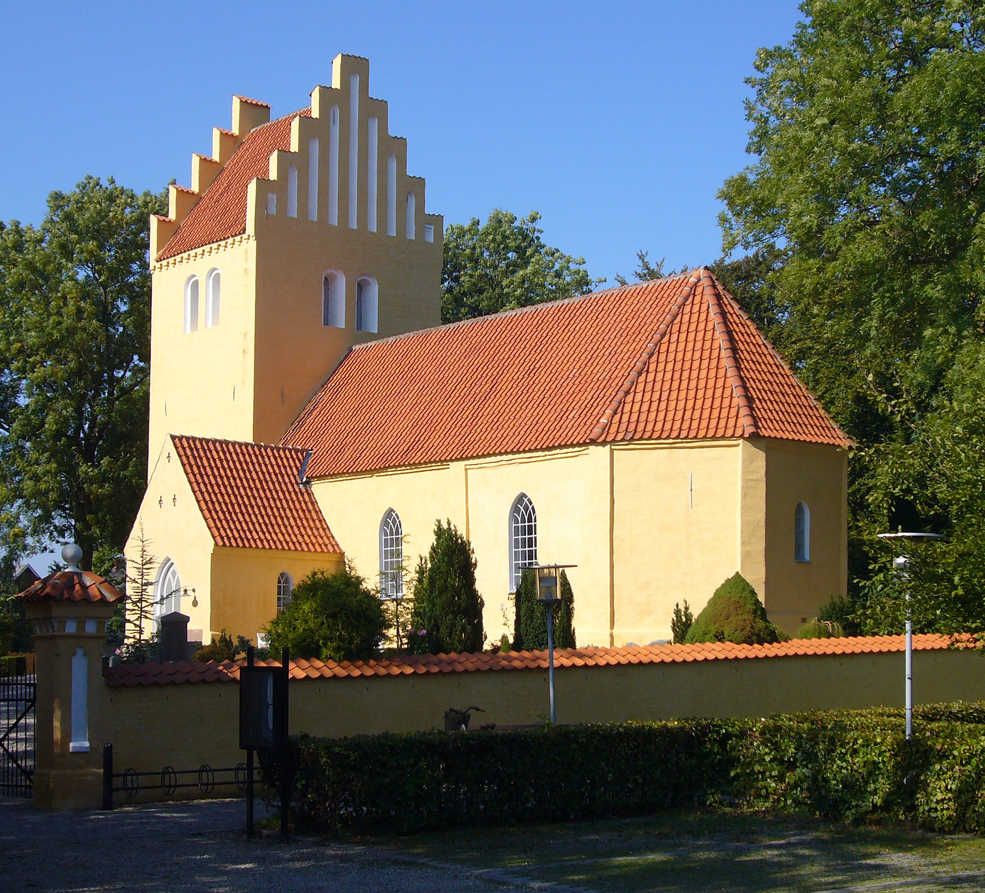 Solrød Kirke in Roskilde County, Denmark Exterior